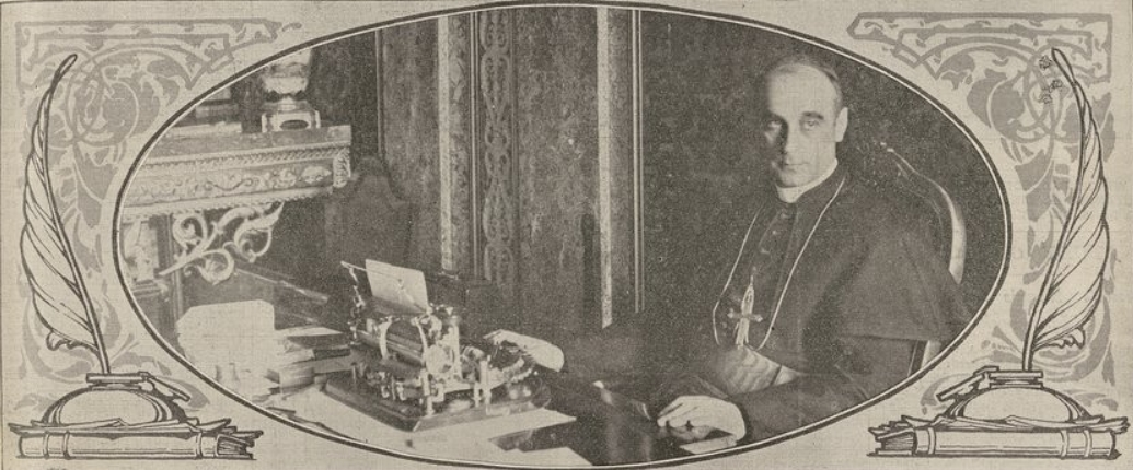 Cardinal Merry del Val, secrétaire d'état de Pie X, photo publiée dans le New York Tribune du 5 aout 1906.